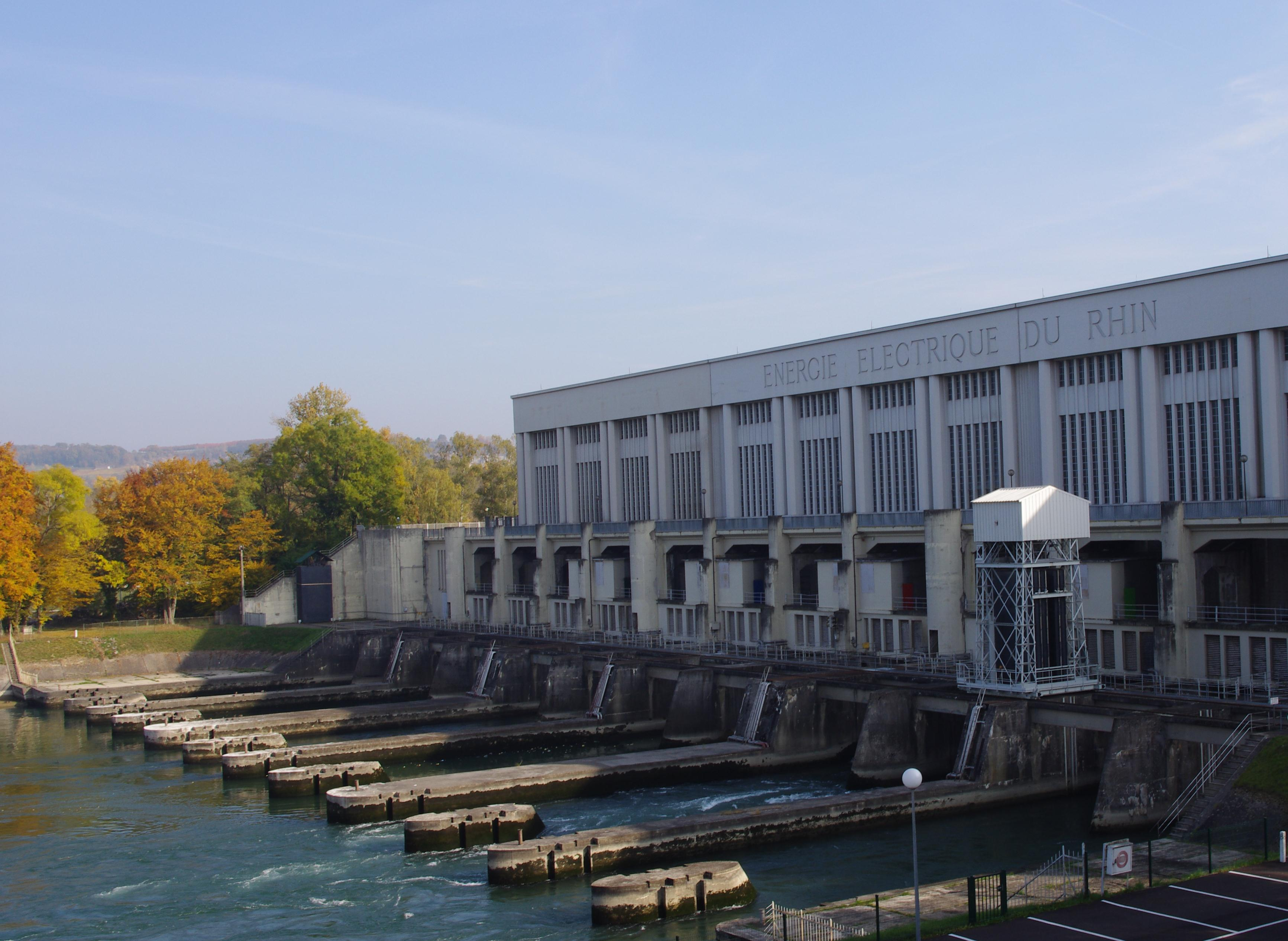 usine hydro-électrique de kembs (barrage)